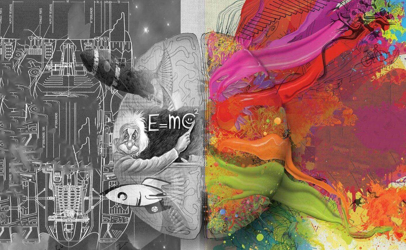 Beynin funksiyarı sol beyin Riyazi, Məntiqi, Gerçəkçi, sağ beyin Xəyalpərəst, Rəng qavrayıcı, Musiqiçi, Yaradıcı.